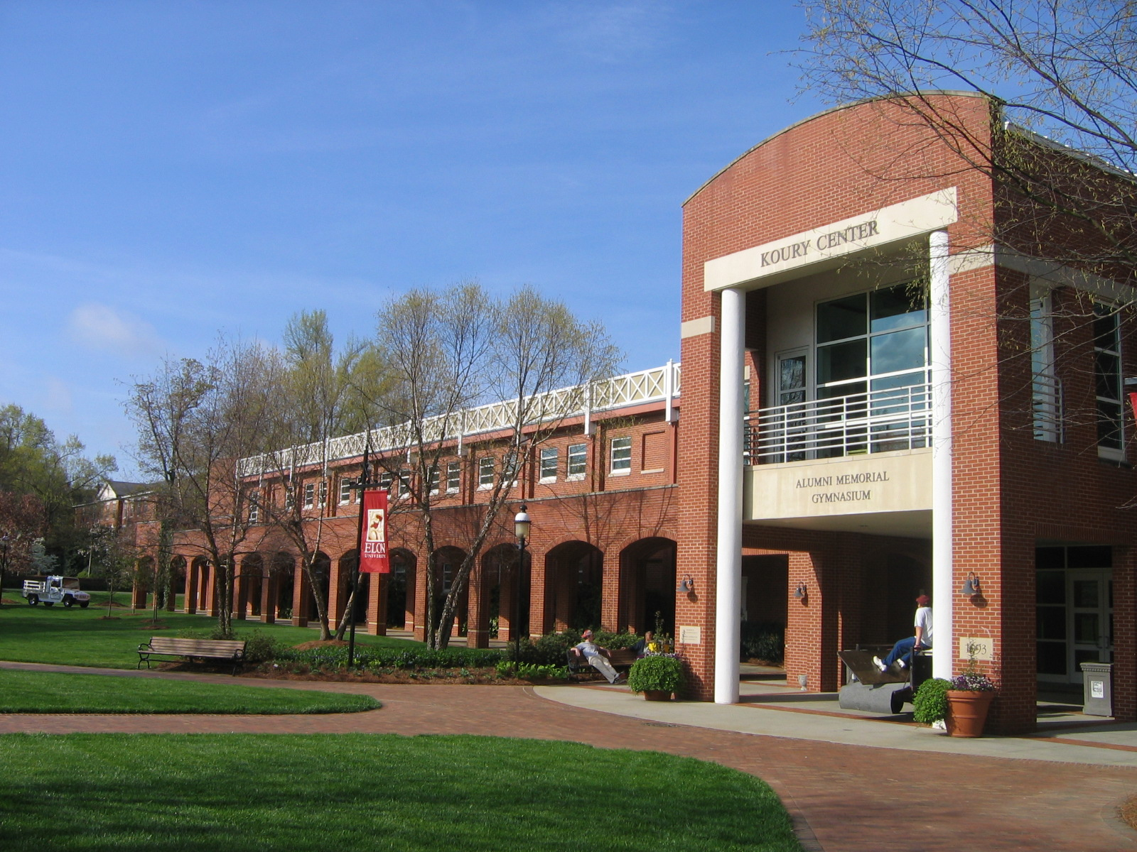 Basketball Facilities Elon U Basketball Arena